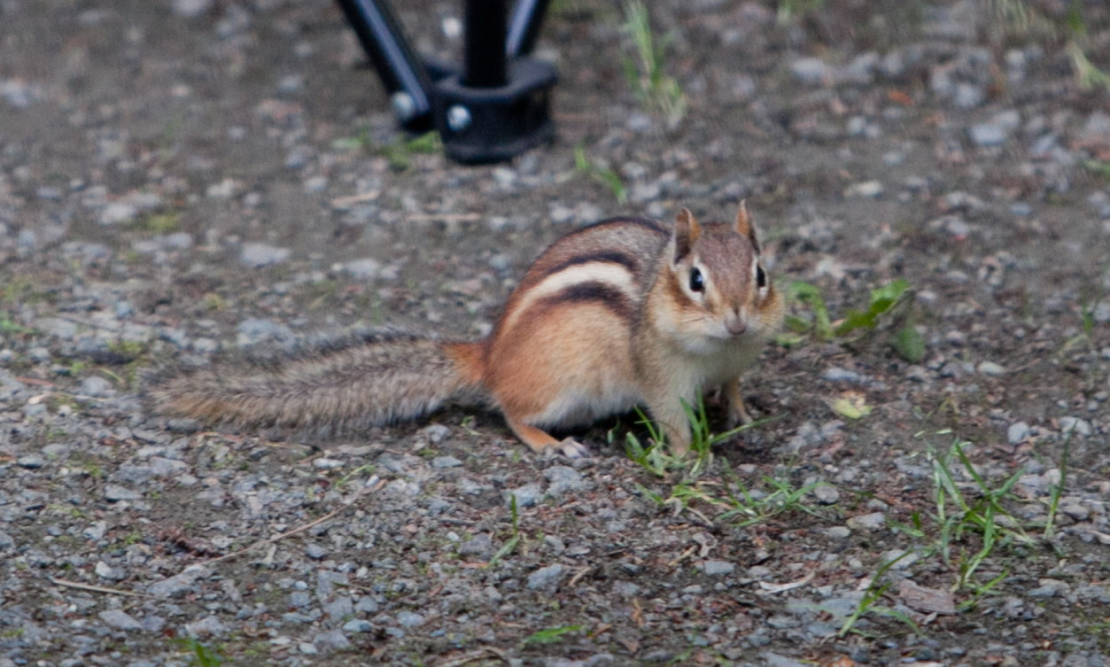 Tamia rayée (Tamias striatus) dans le parc national de Fundy